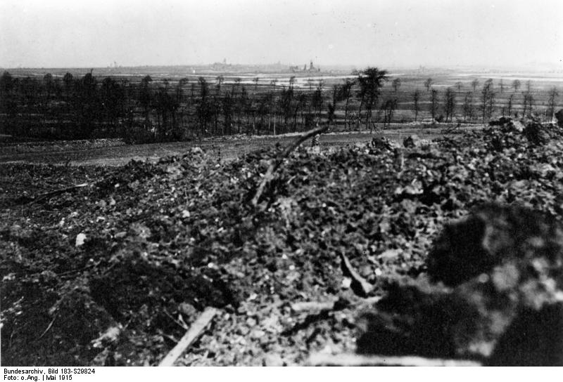 Frankreich, Lorettohöhe Westfront. Blick von der Lorettohöhe auf das Kampfgelände. 9. Mai 1915 Information added by Wikimedia users.